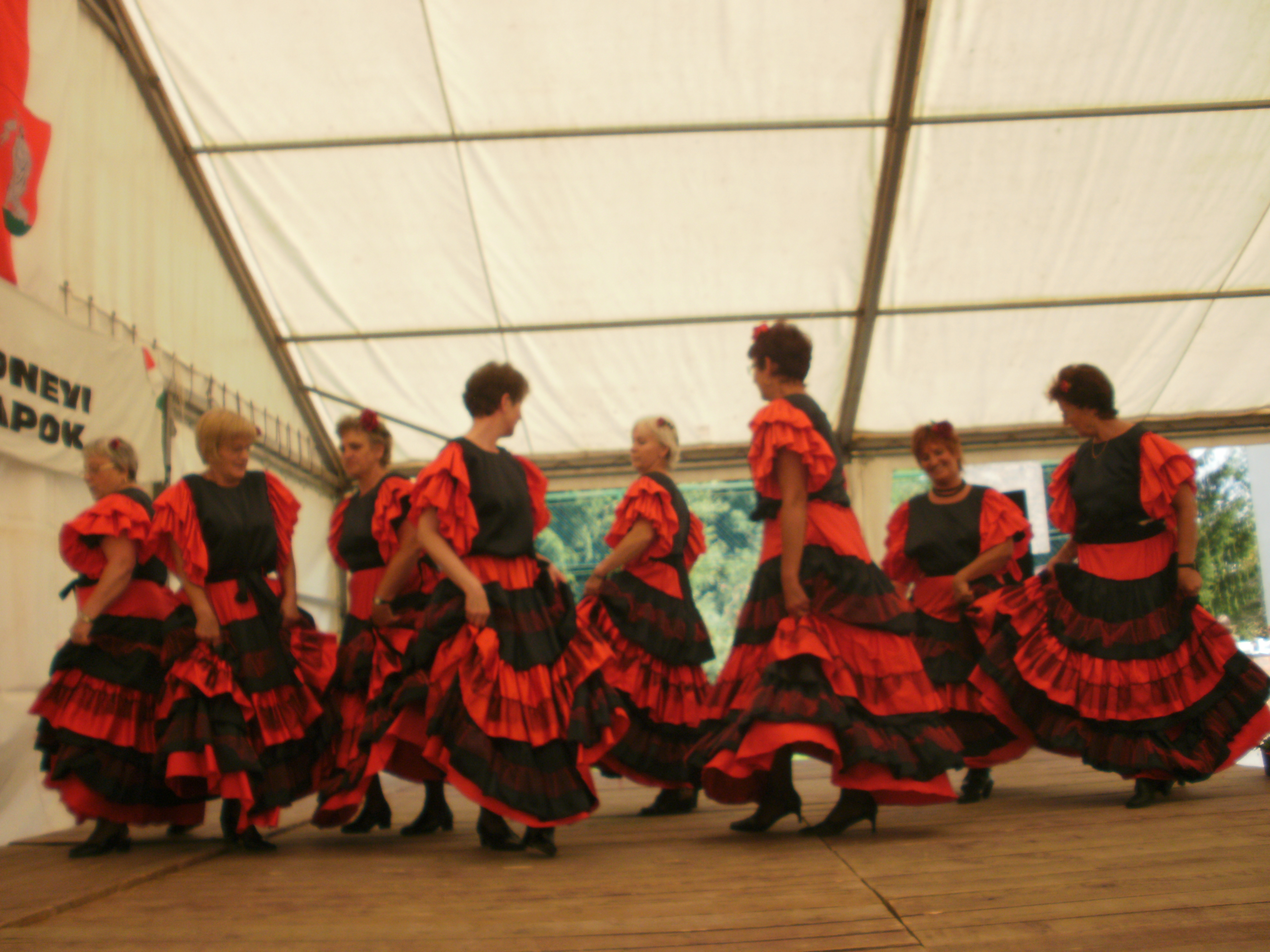 Fellépők a felsőszölnöki falunapon (Vas megye)